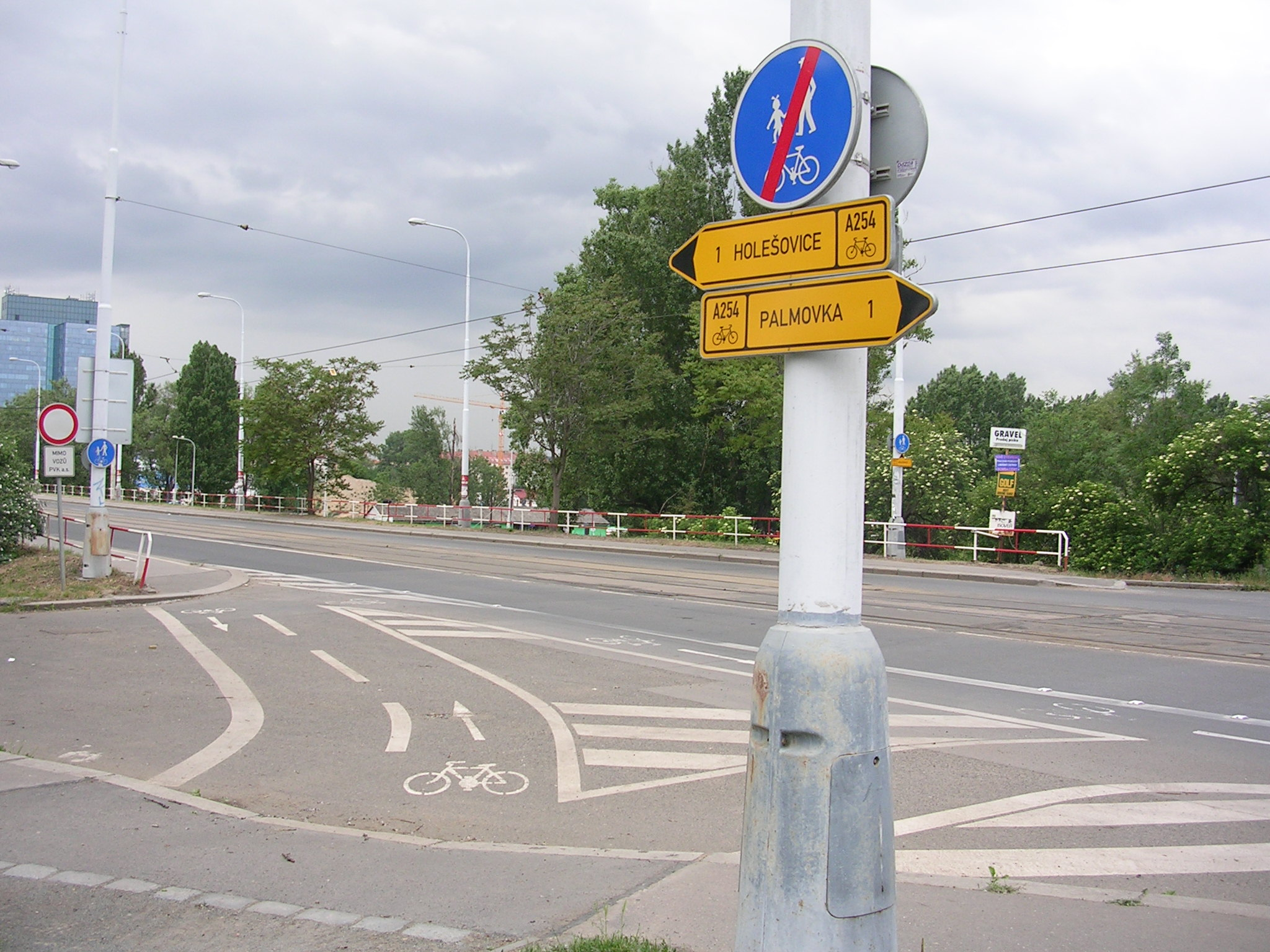 Praha, Libeňský most. „Stezka pro chodce a cyklisty“ a „Vyhrazený jízdní pruh“ pro cyklisty